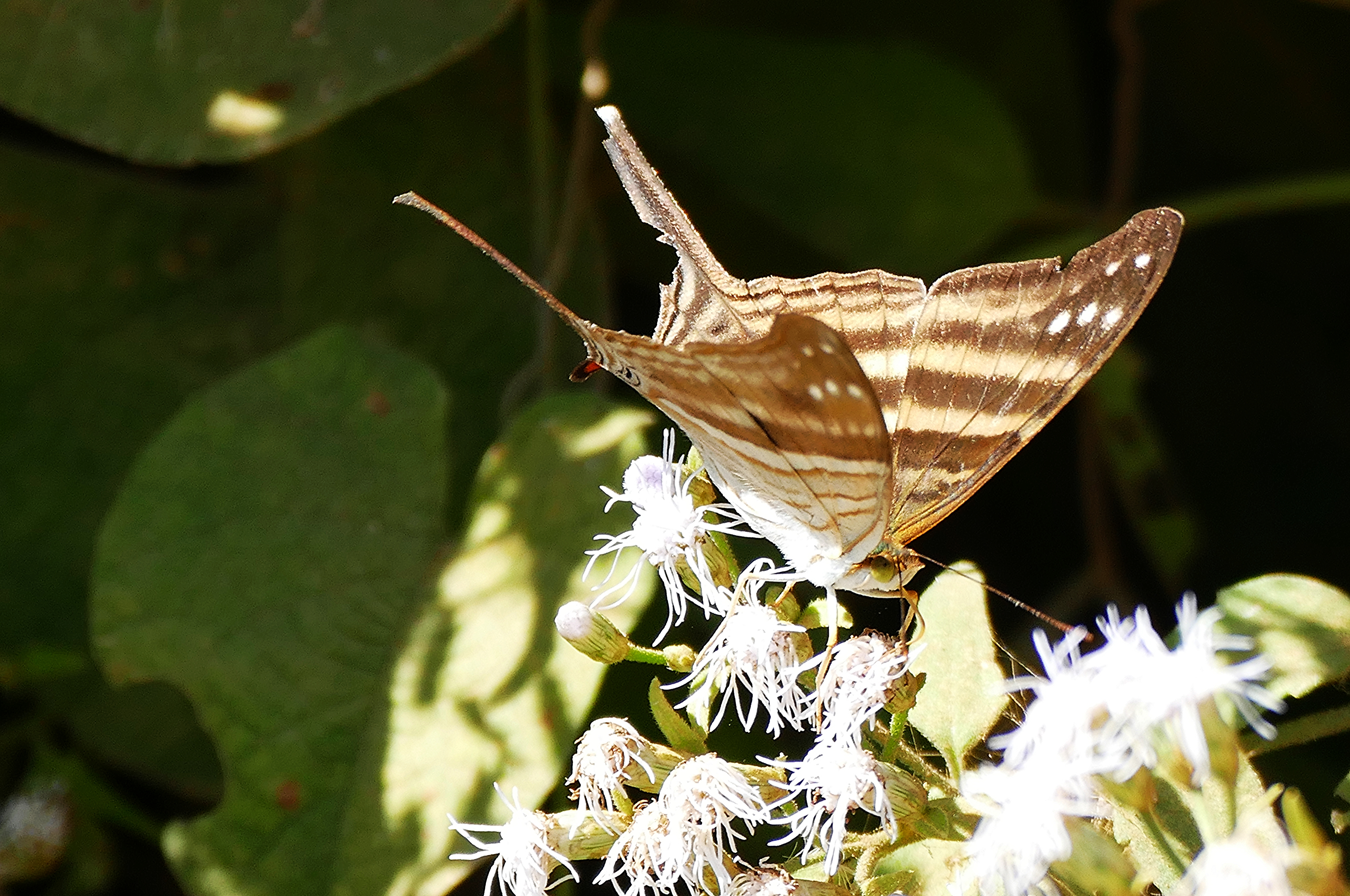 Transpantaneira, Poconé, Mato Grosso, BRAZIL